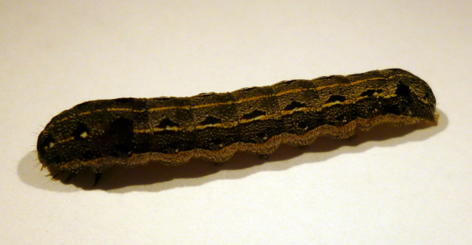 Larva de Spodoptera littoralis en un estadi intermig de desenvolupament